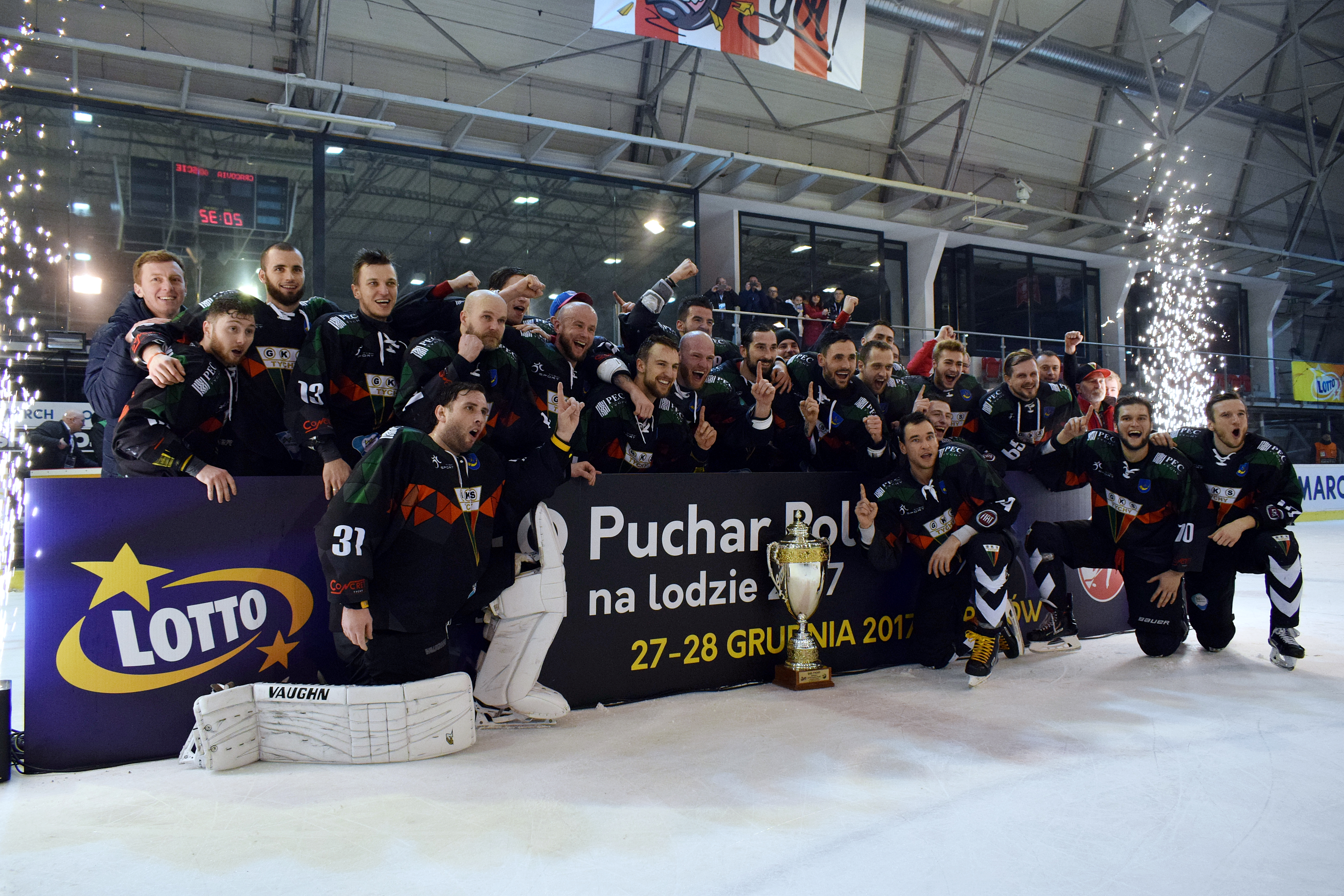 Zdobywca Pucharu Polski drużyna GKS Tychy